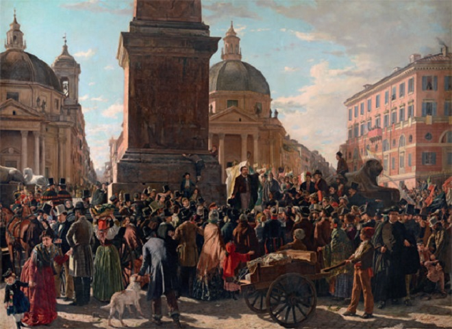 "Ciceruacchio annuncia al popolo romano la concessione dello Statuto", olio su tela, 155 x 207 cm, Museo di Roma